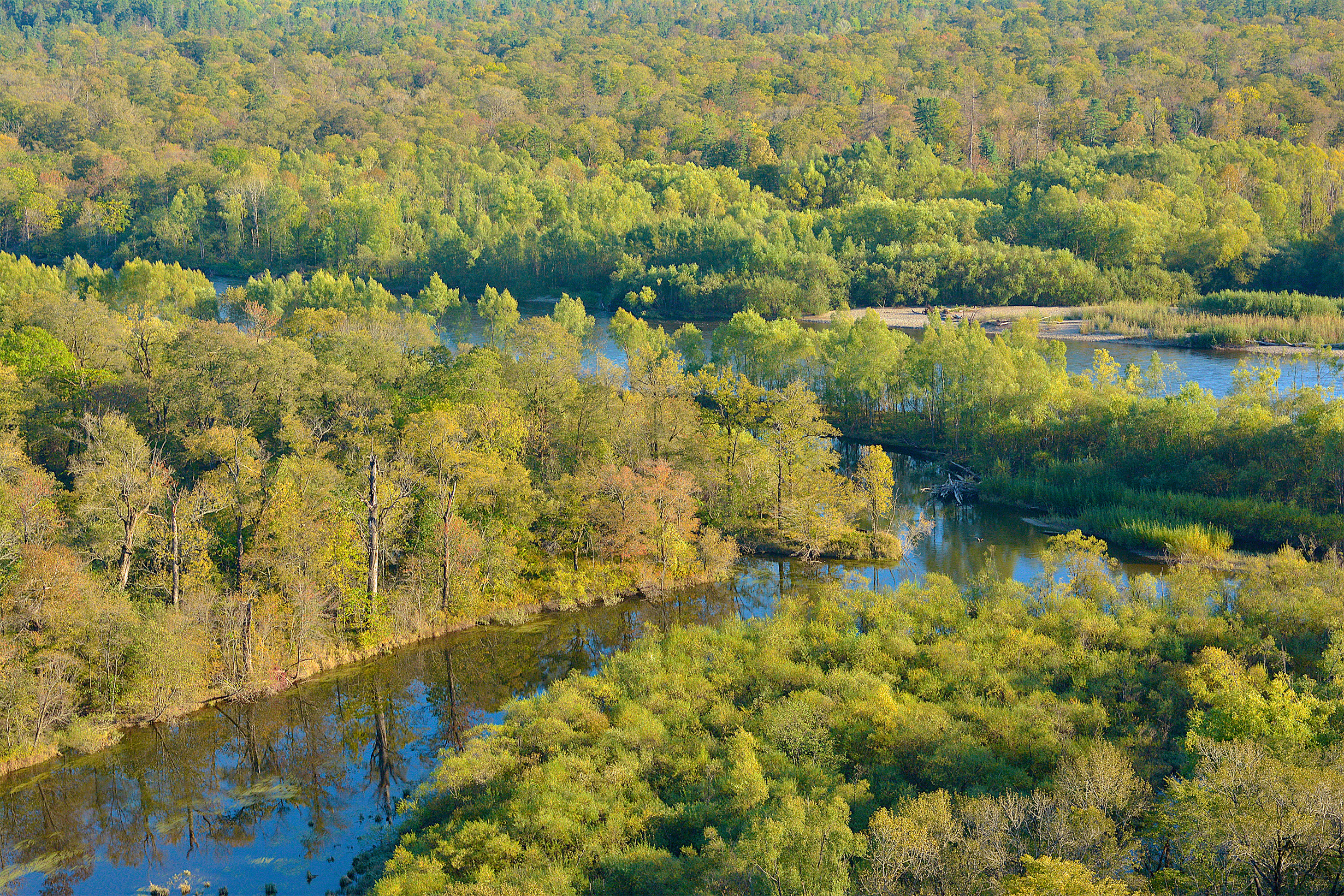 Территория традиционного природопользования, Пожарский район